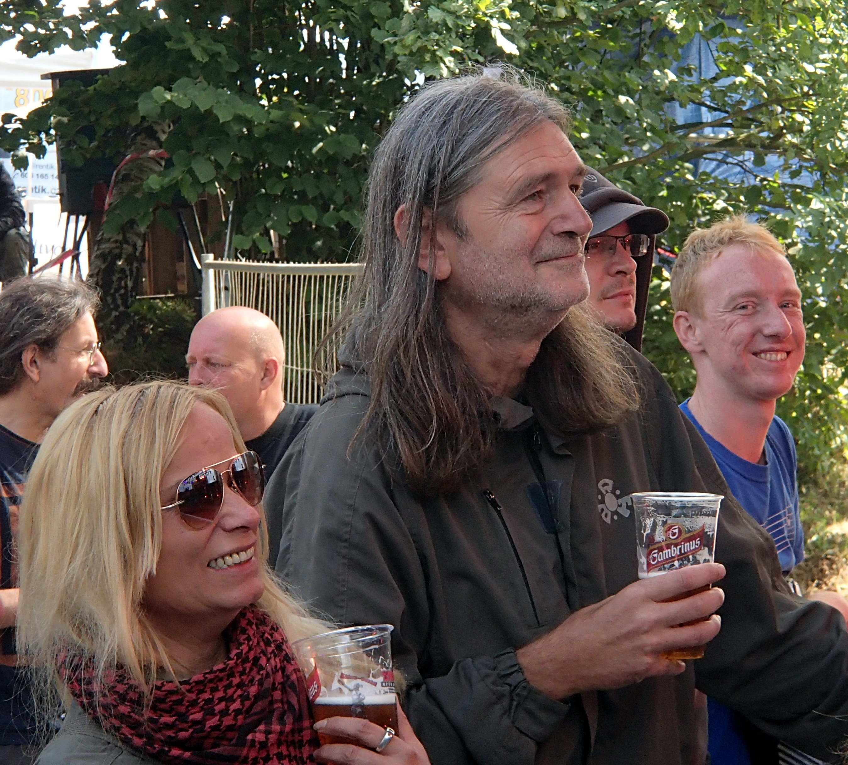 Záviš at Trutnov Open Air Music Festival